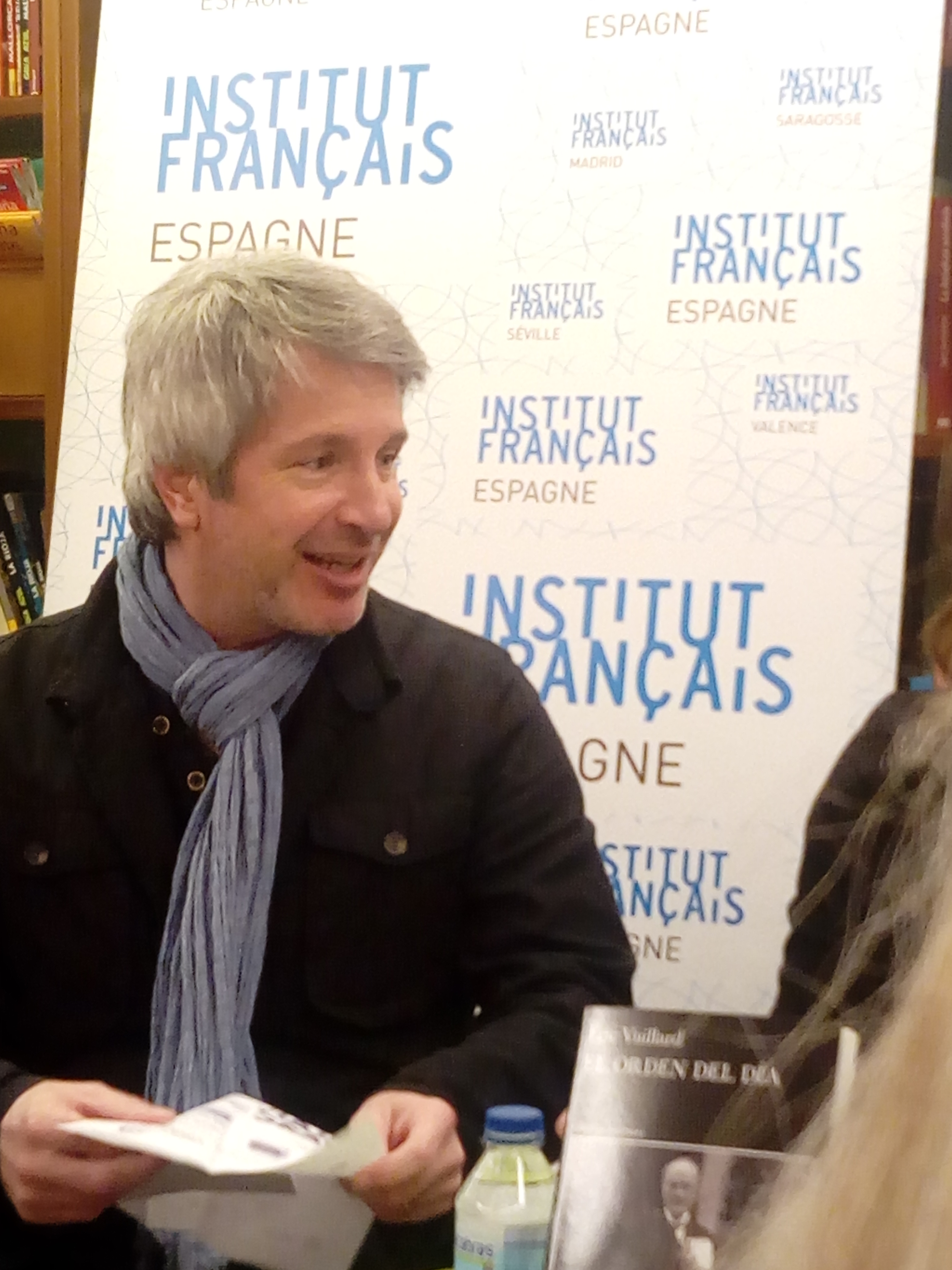 Vuillard presenta 'El orden del día'